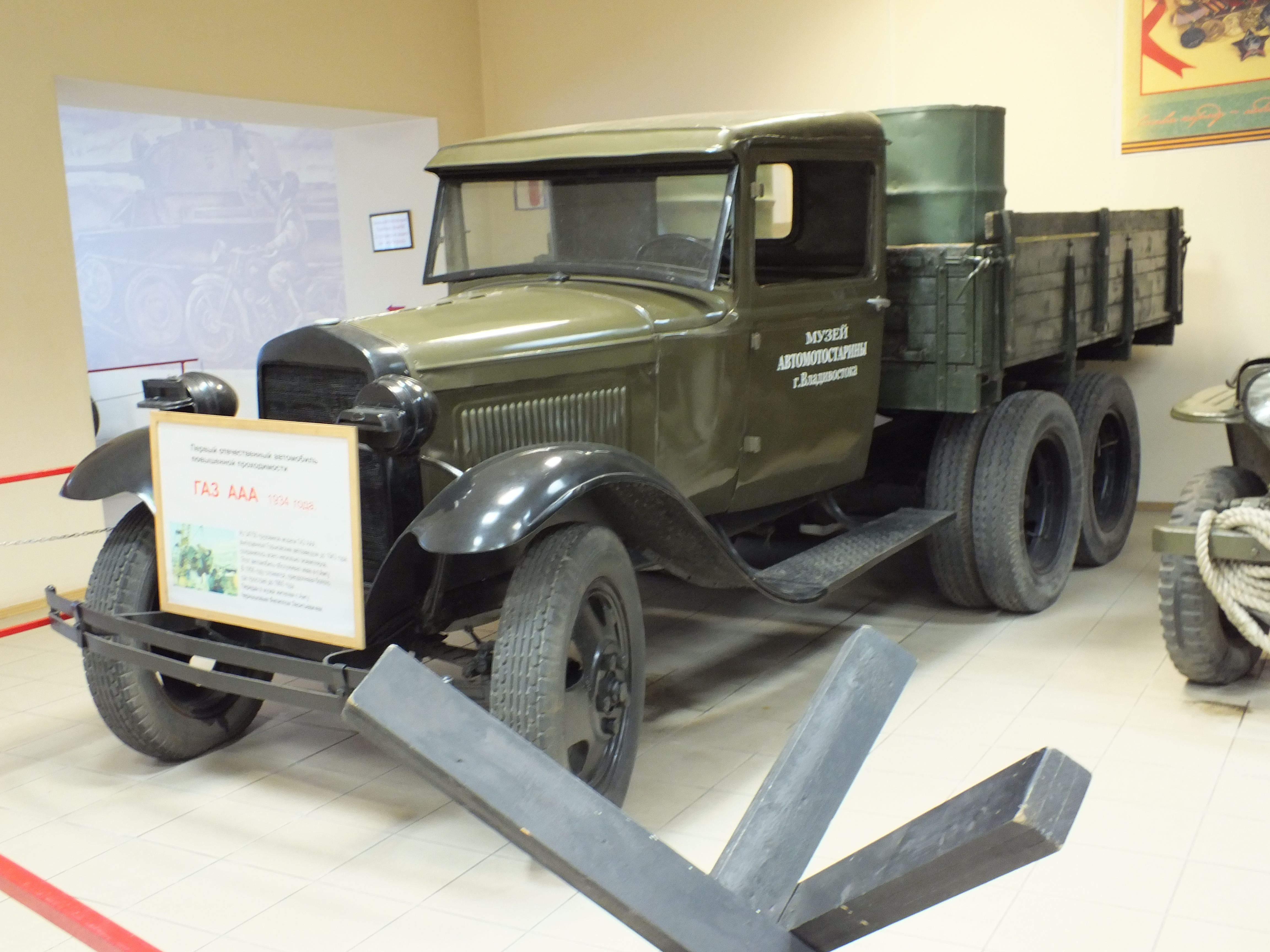 GAZ-AAA